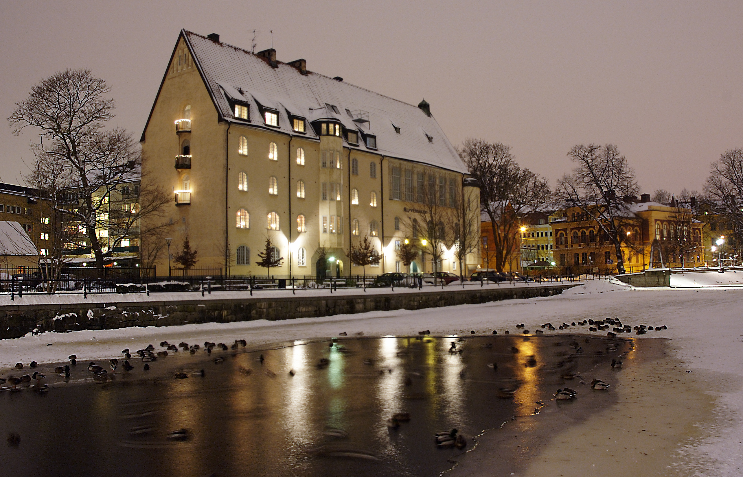 Photo of Alfvénsalen at Orphei Drängars plan, Uppsala, Sweden.